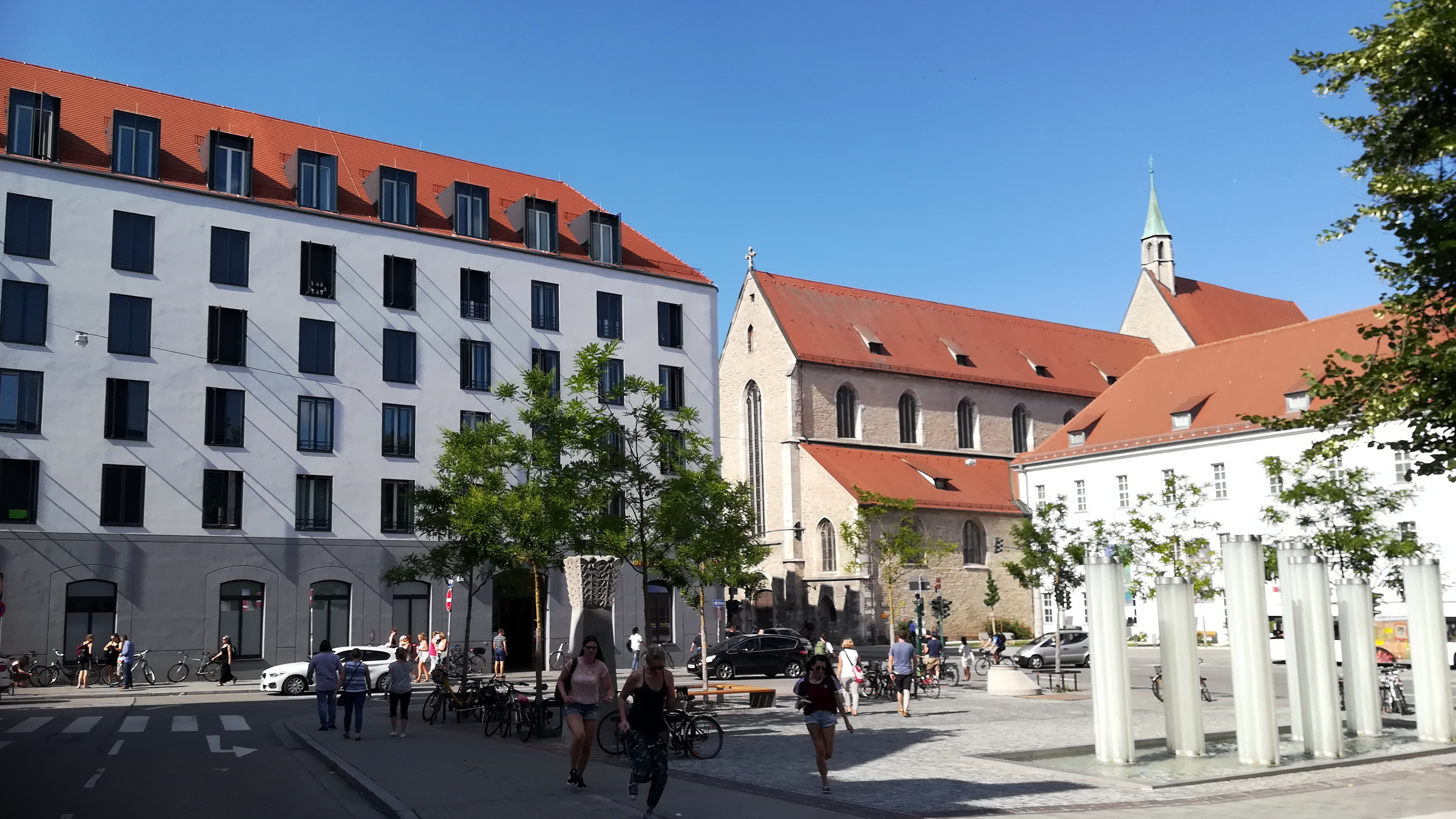 Der Dachauplatz ist ein historischer Platz der Regensburger Innenstadt.